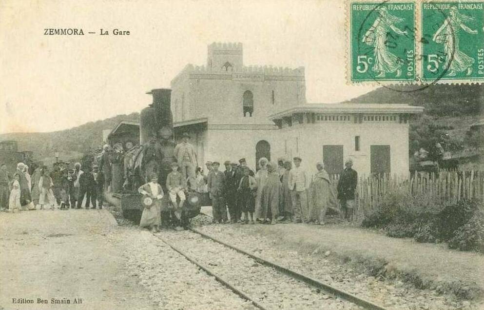 Gare de Zemmora avant 1962 (style mauresque).